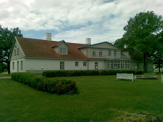 Pürksi mõisahoone.